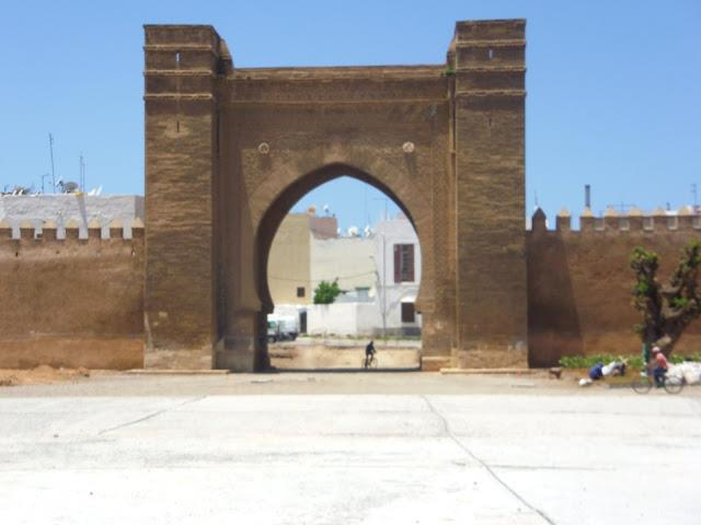 restauration esplanade bab lamrissa